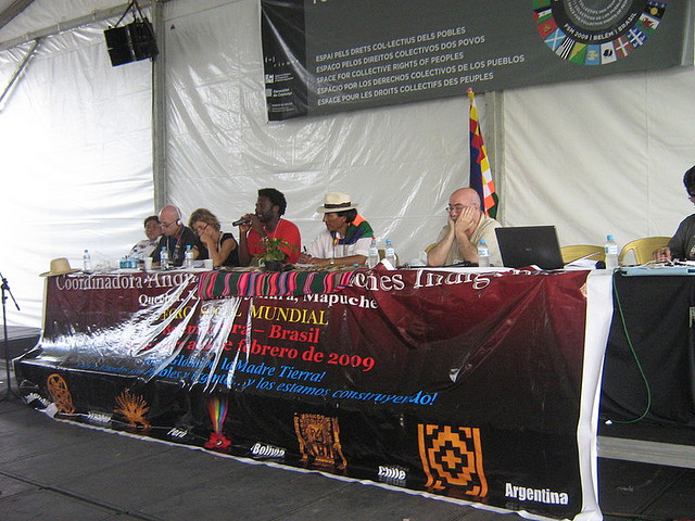 Primera edició de l'eix Fòrum crisi de civilització, amb la participació de Tomás Huanacu, CONAMAQ (Bolívia), Josinaldo Barbosa, COIAB (Amazònia), Domingo Hernández, Convergencia Maya Waqib' Kej (Guatemala), Meena Menom, Focus on the Global South (Índia- India) José Carlos Galiza, Malungu (Pará, Brasil), Mercia Andrews, TCOE (Sud-àfrica - South Africa), Iñaki Gil de San Vicente, convidat per Herriak Aske (País Basc), Paolo Beni, ARCI (Itàlia), Roberto Libegotti, CIMI (Brasil). Modera Audalice Otterloo, ABONG (Brasil). Cloenda i conclusions Agustí Nicolau-Coll, CIEMEN (Catalunya).